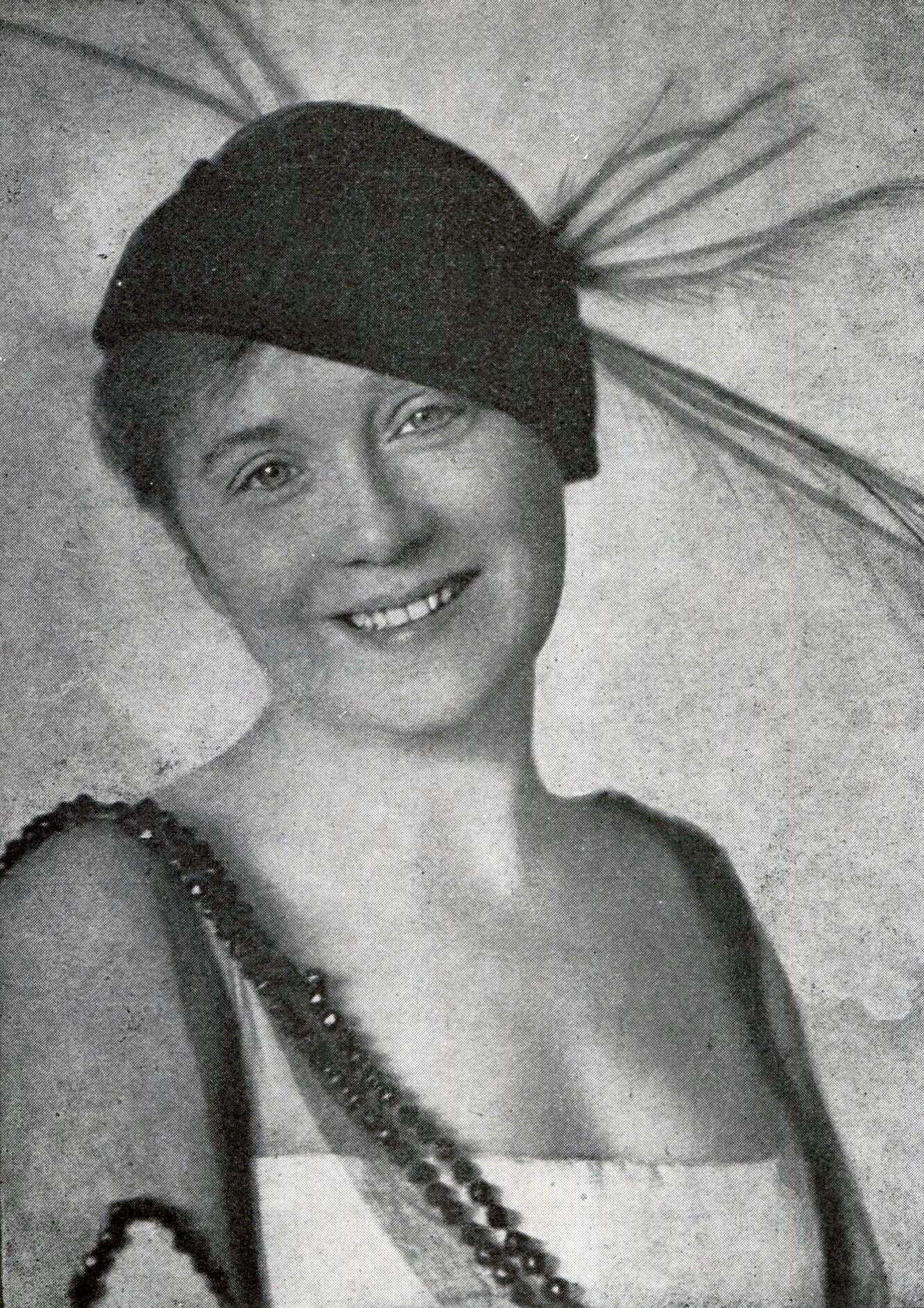 Elna Panduro (1882-1993)